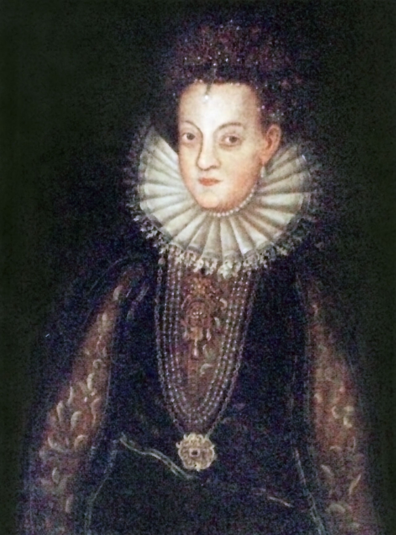 Беларуская (тарашкевіца): Партрэт Соф’і Хадкевіч (Sofja Chadkievič) з роду Радзівілаў (Radzivił)